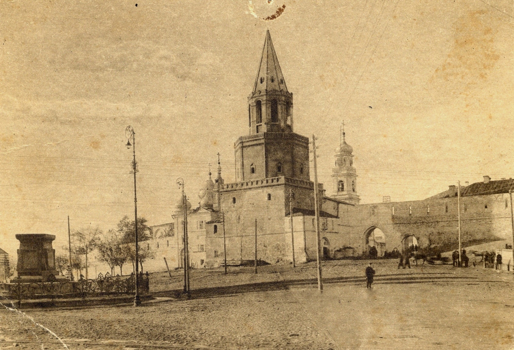 Спасская башня Казанского Кремля.